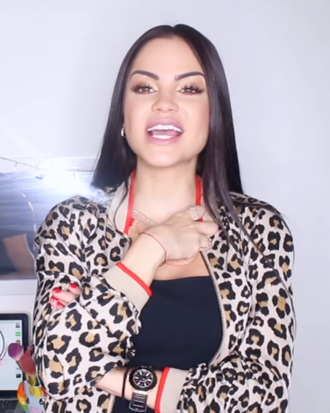 Nati Natasha en entrevista en 2017